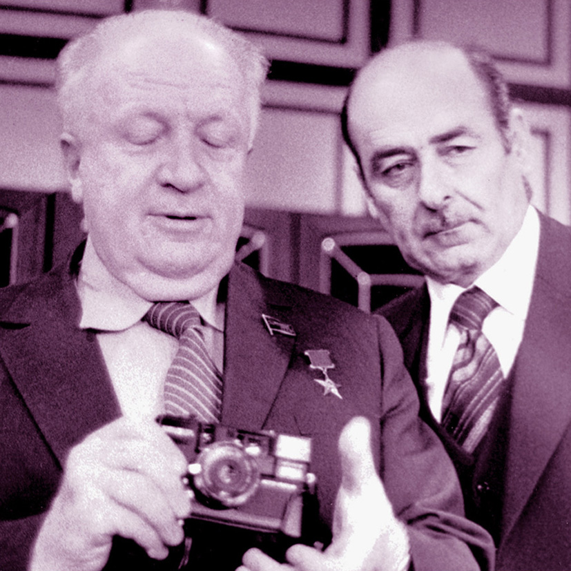 Ալեքսանդր Միքայելյանը կոնֆերանսի ժամանակ